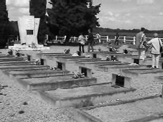 camp internament Vernet d'Ariège